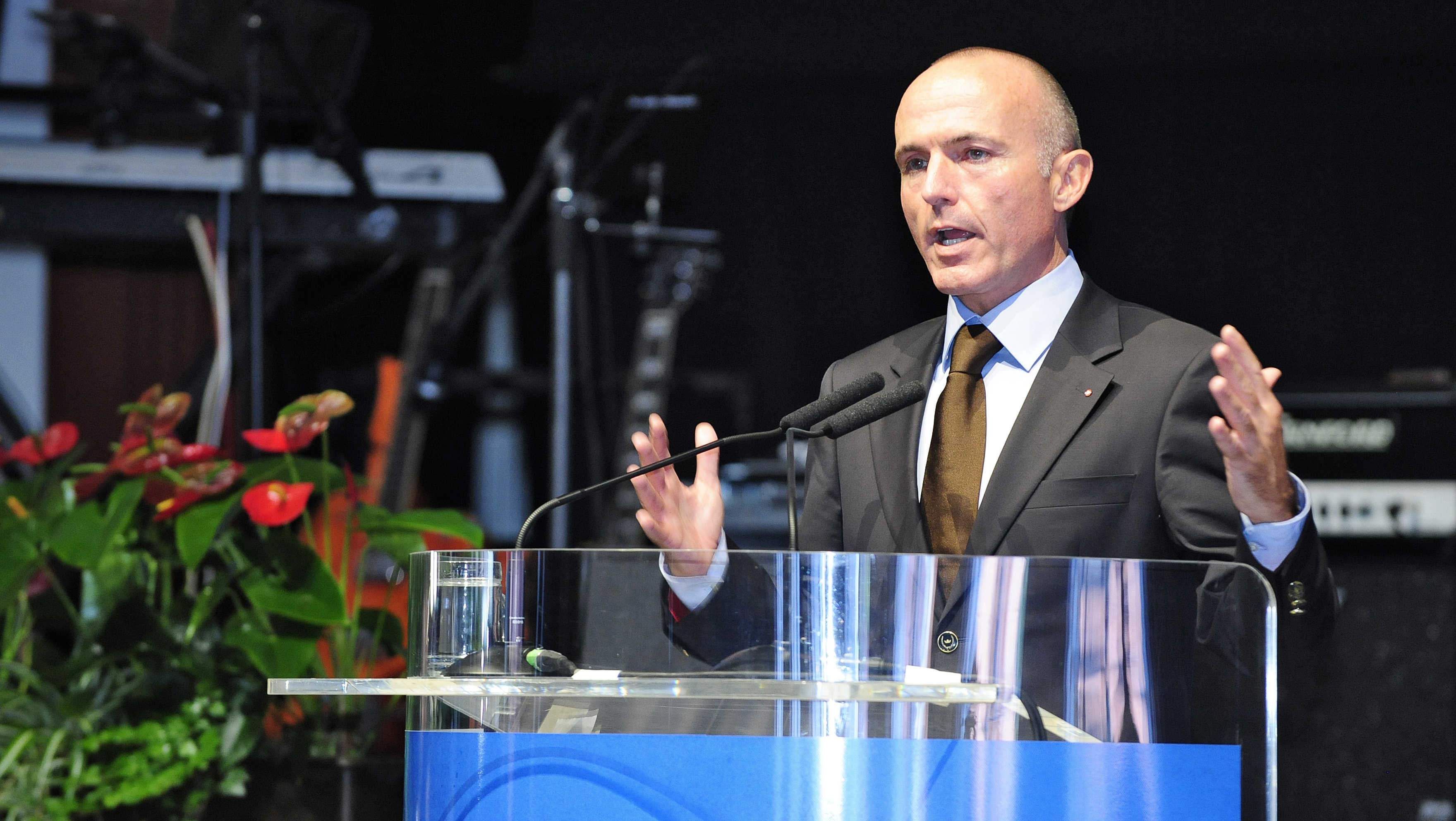 Wahlveranstaltung der SPÖ zur Nationalratswahl 2013 mit Bundeskanzler Werner Faymann, Verteidigungsminister Gerald Klug und Landeshauptmann Franz Voves im Kulturhaus Bruck an der Mur.